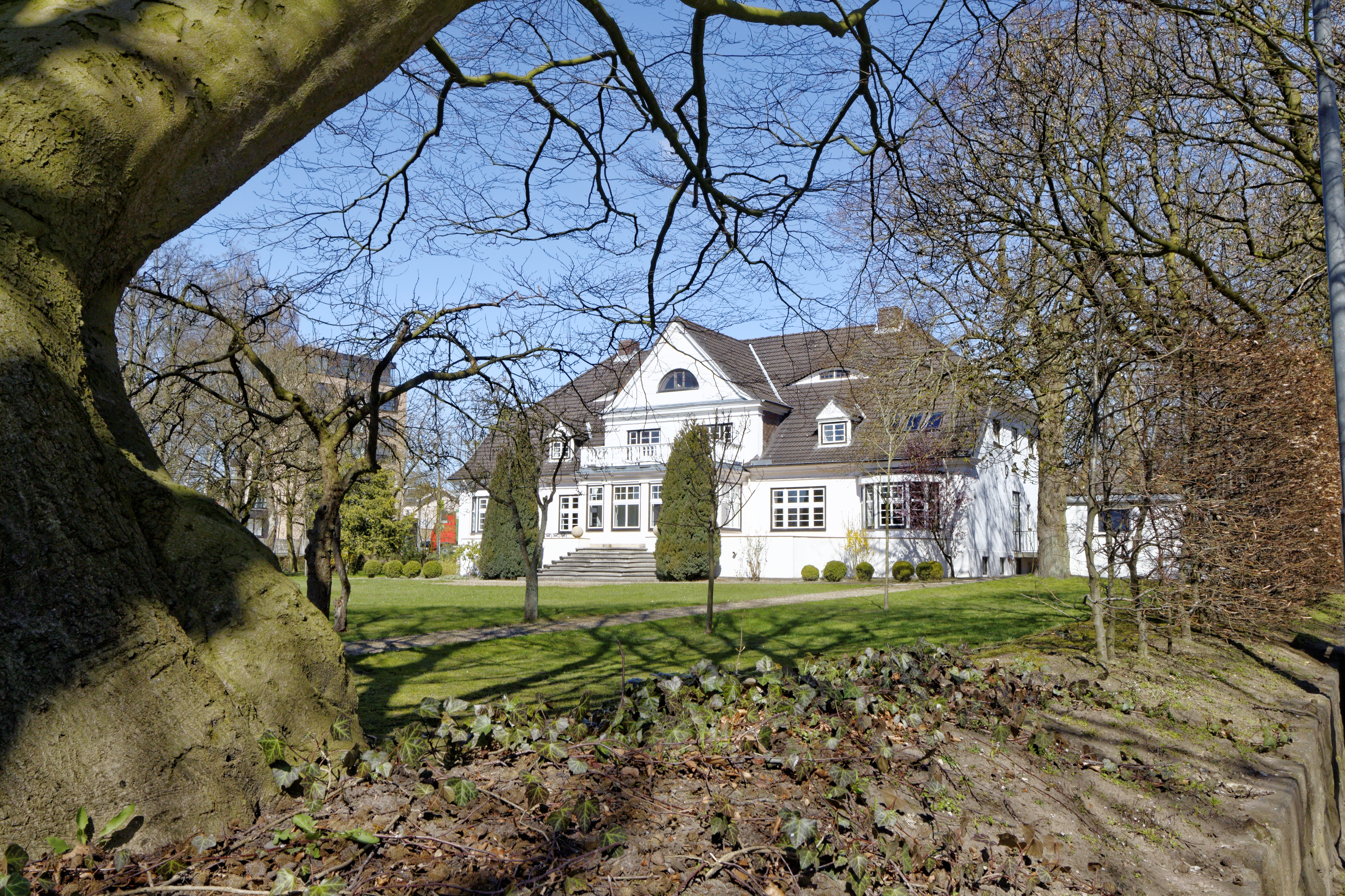 Büdelsdorf, Brückenstr. 1; Direktorenvilla; Denkmalnr:10191